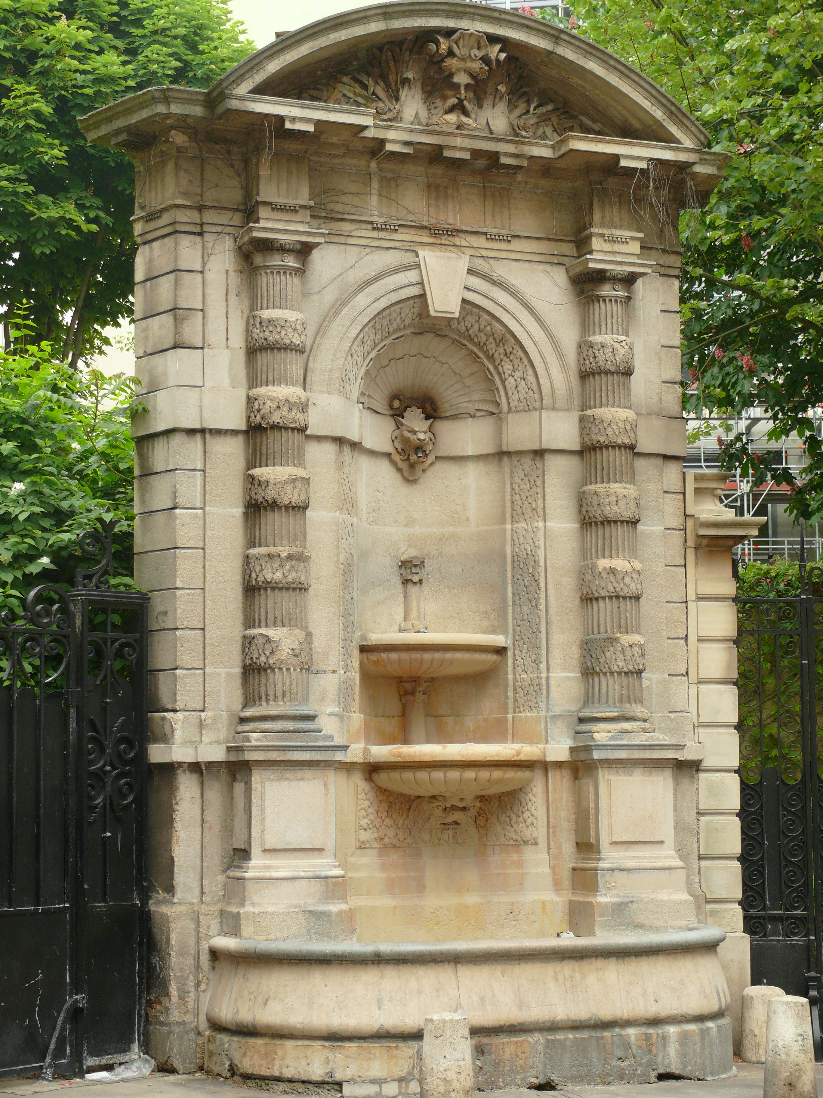 Paris 9ème arrondissement - Fontaine de la rue du Cardinal-Mercier